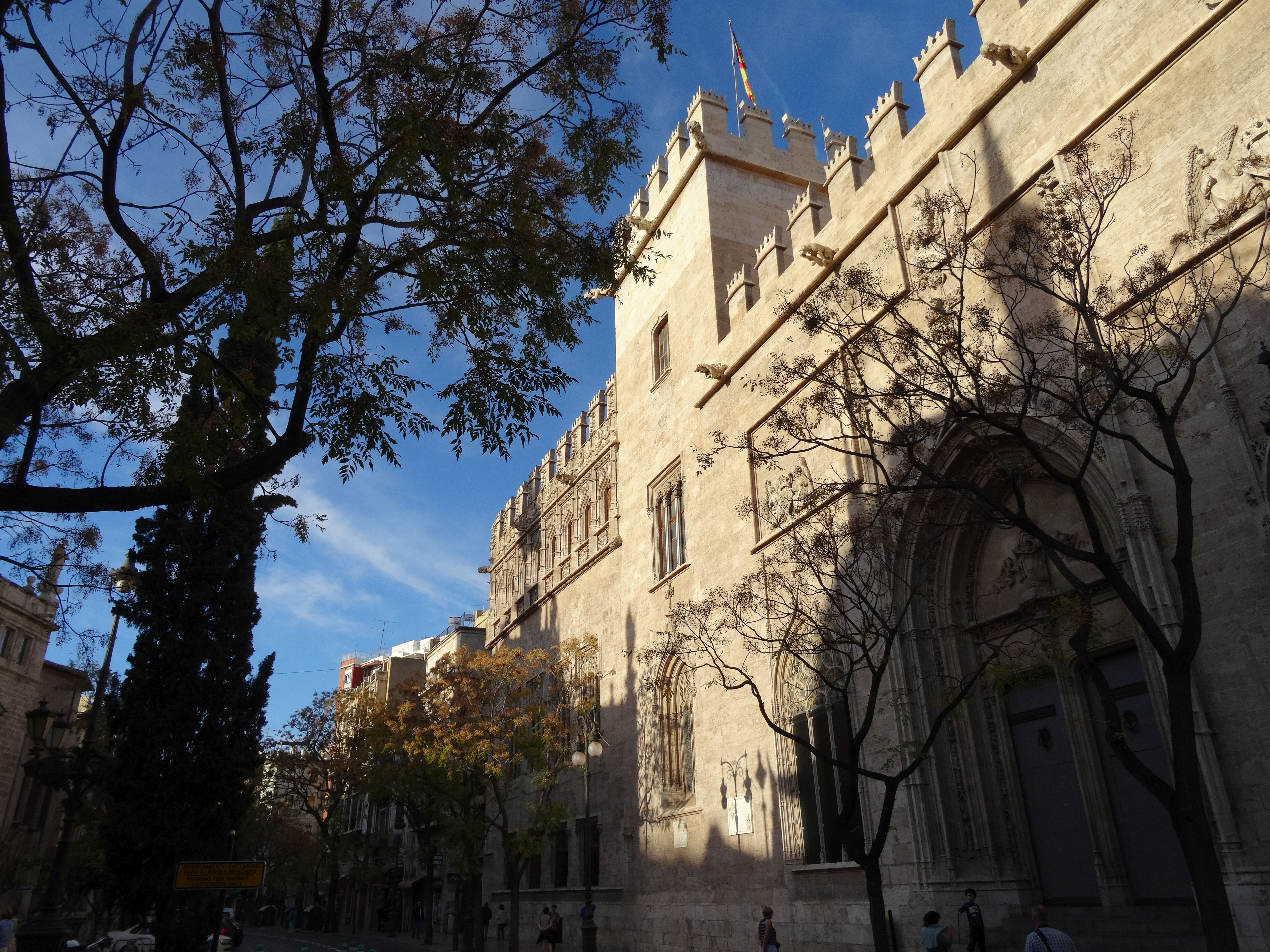 20151120 031 Valencia - La Lonja de la Seda